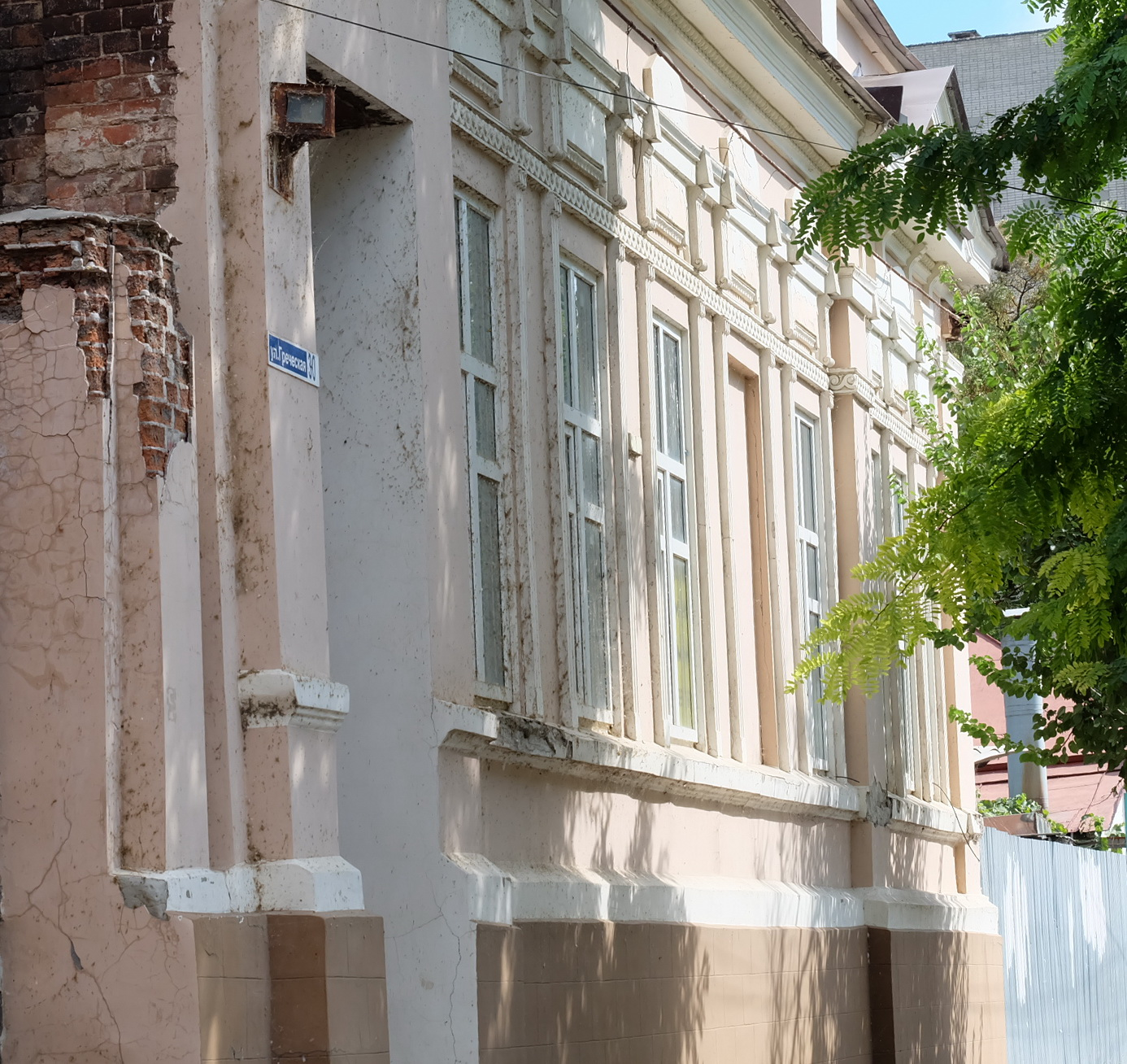 Жилой дом, комплекс застройки улицы: улица Греческая, 30, Таганрог, Ростовская область